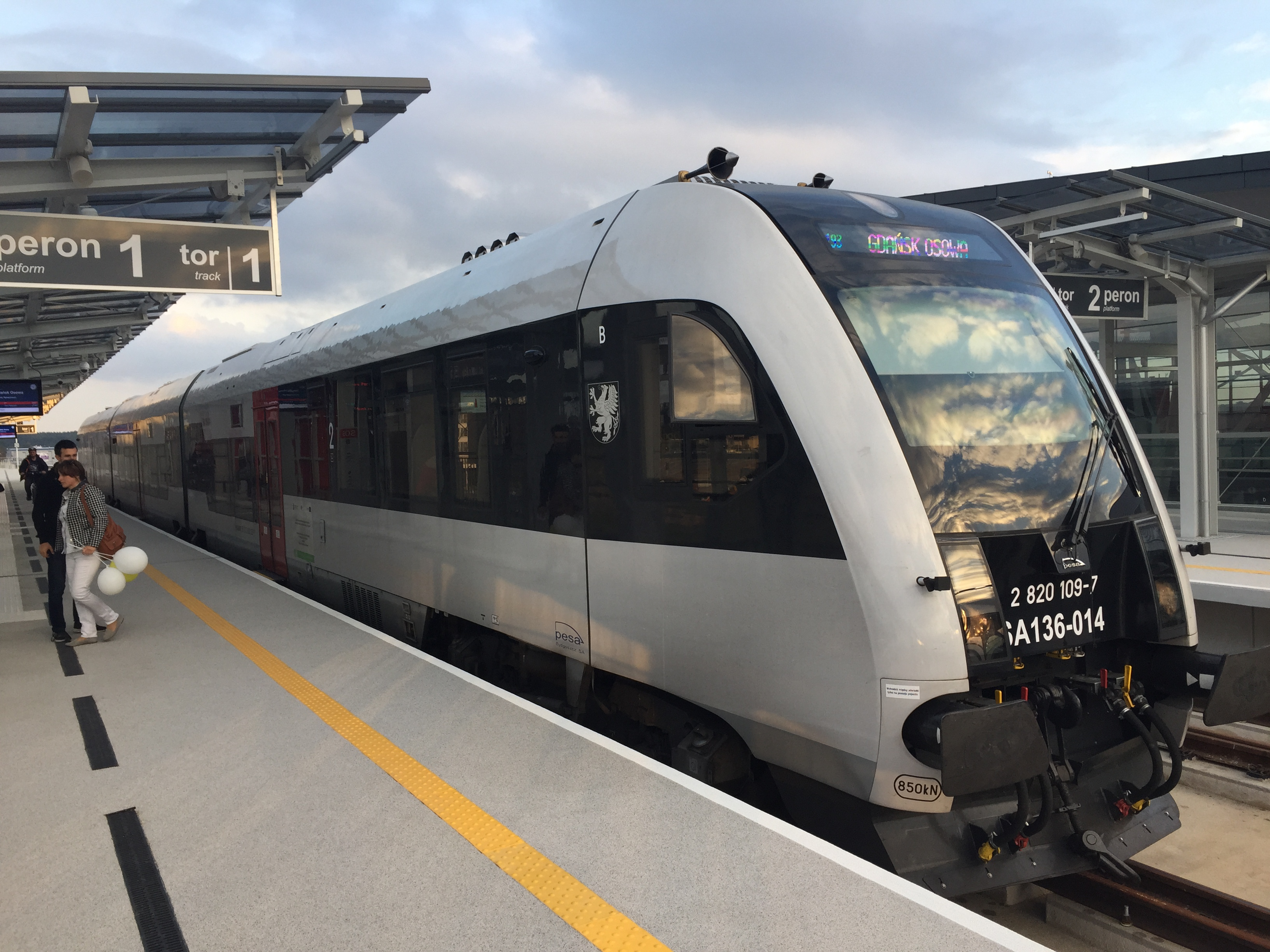 PKM Gdańsk Port Lotniczy This photo was taken during Railway Wikiexpedition 2015 set up by Wikimedia Polska Association in cooperation with Fundacja Grupy PKP.You can see all photographs in category Wikiekspedycja kolejowa 2015.